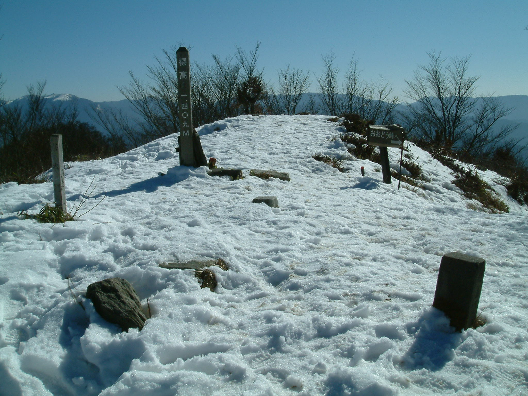 徳島県三好市にある国見山の頂上